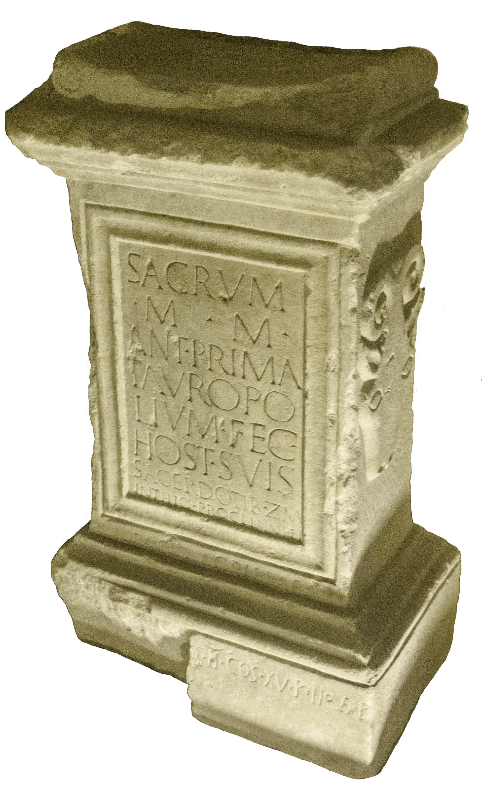 Autel taurobolique d’Antonia Prima. Musée Eugène-Camoreyt de Lectoure, Gers, France.